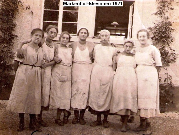 Der Markenhof war ein Hachschara-Lehrgut. Seine Absolventen gründeten in Palästina den Kibbuz Beth Sera (Beit Zera)